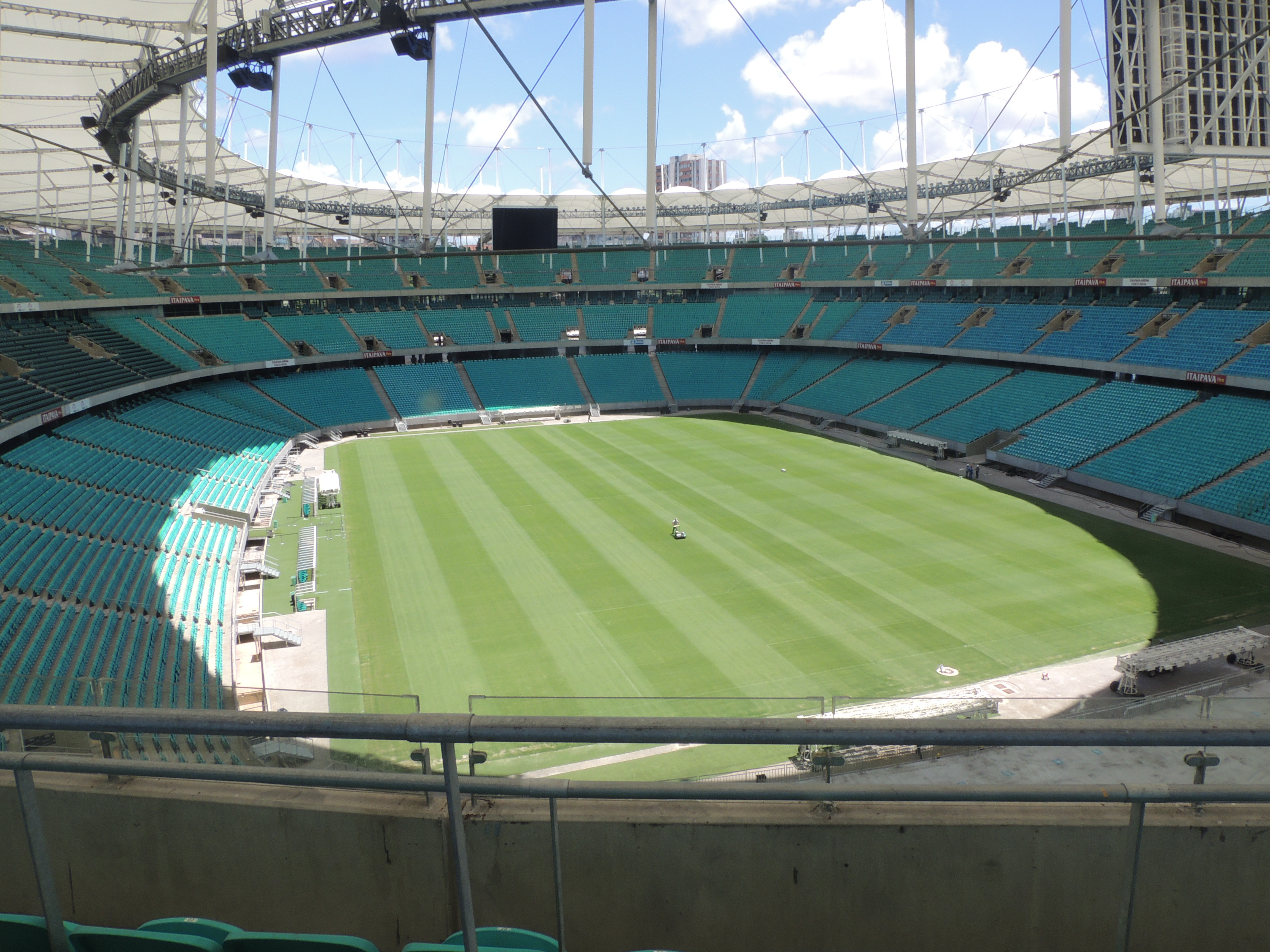 Cancha del Estadio Forte Nova